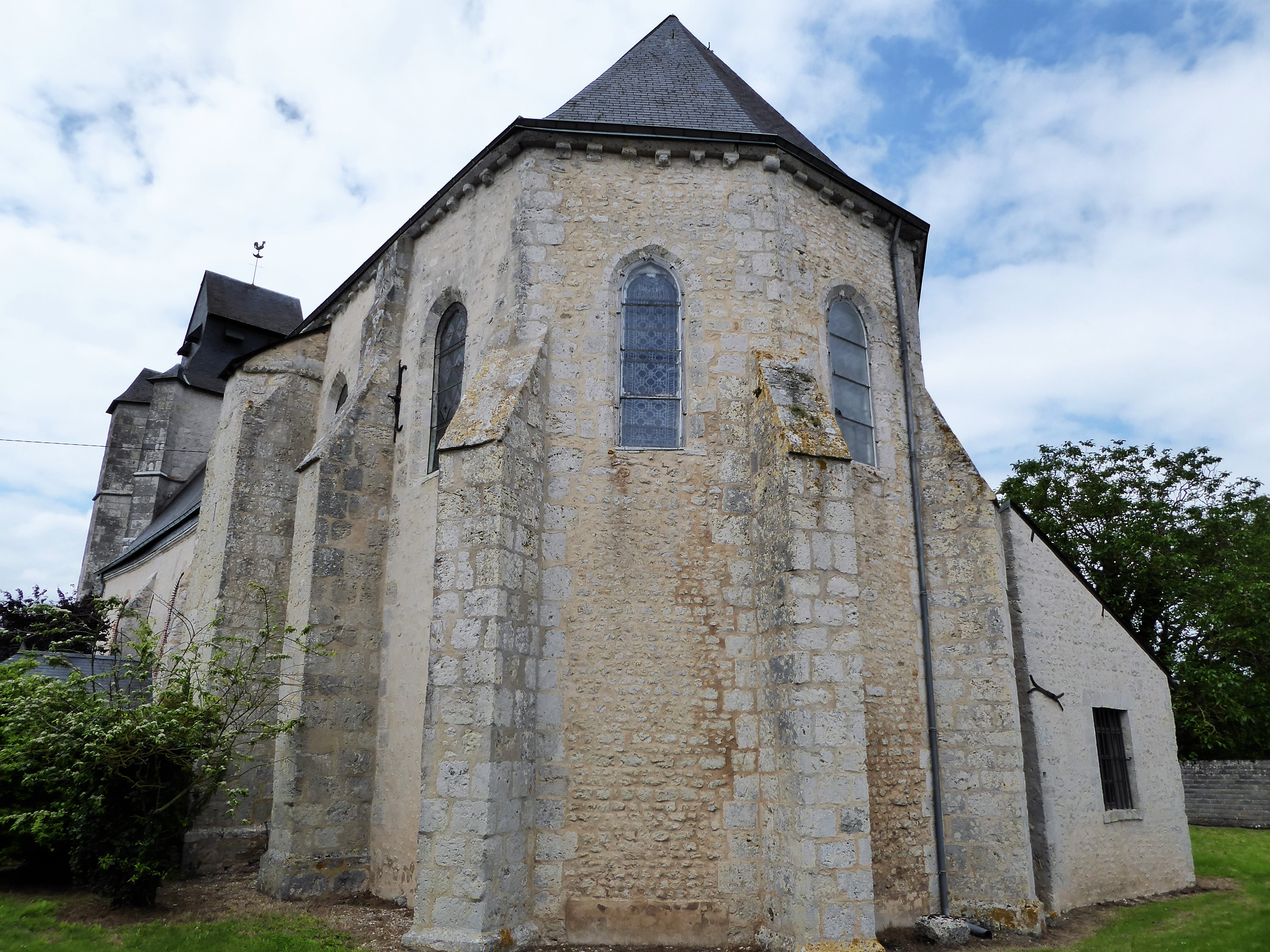 abside de l'église Saint-Pierre, Lumeau, Eure-et-Loir, France.